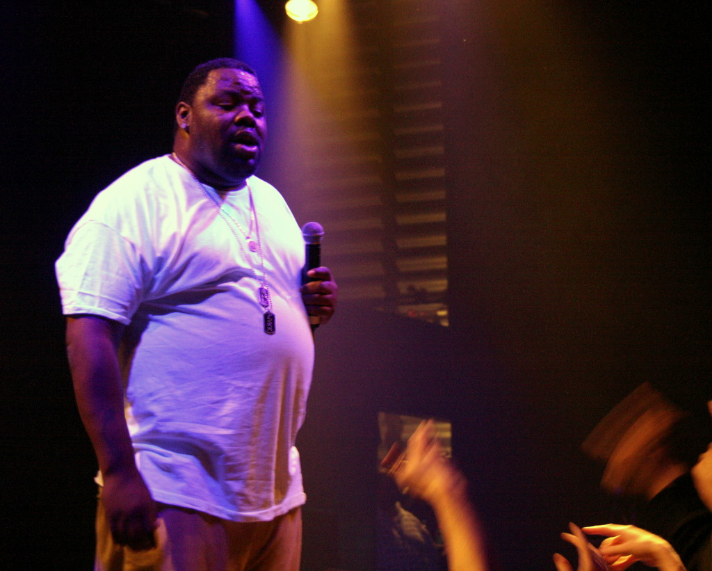 Biz Markie performing in Amager Bio, Denmark.